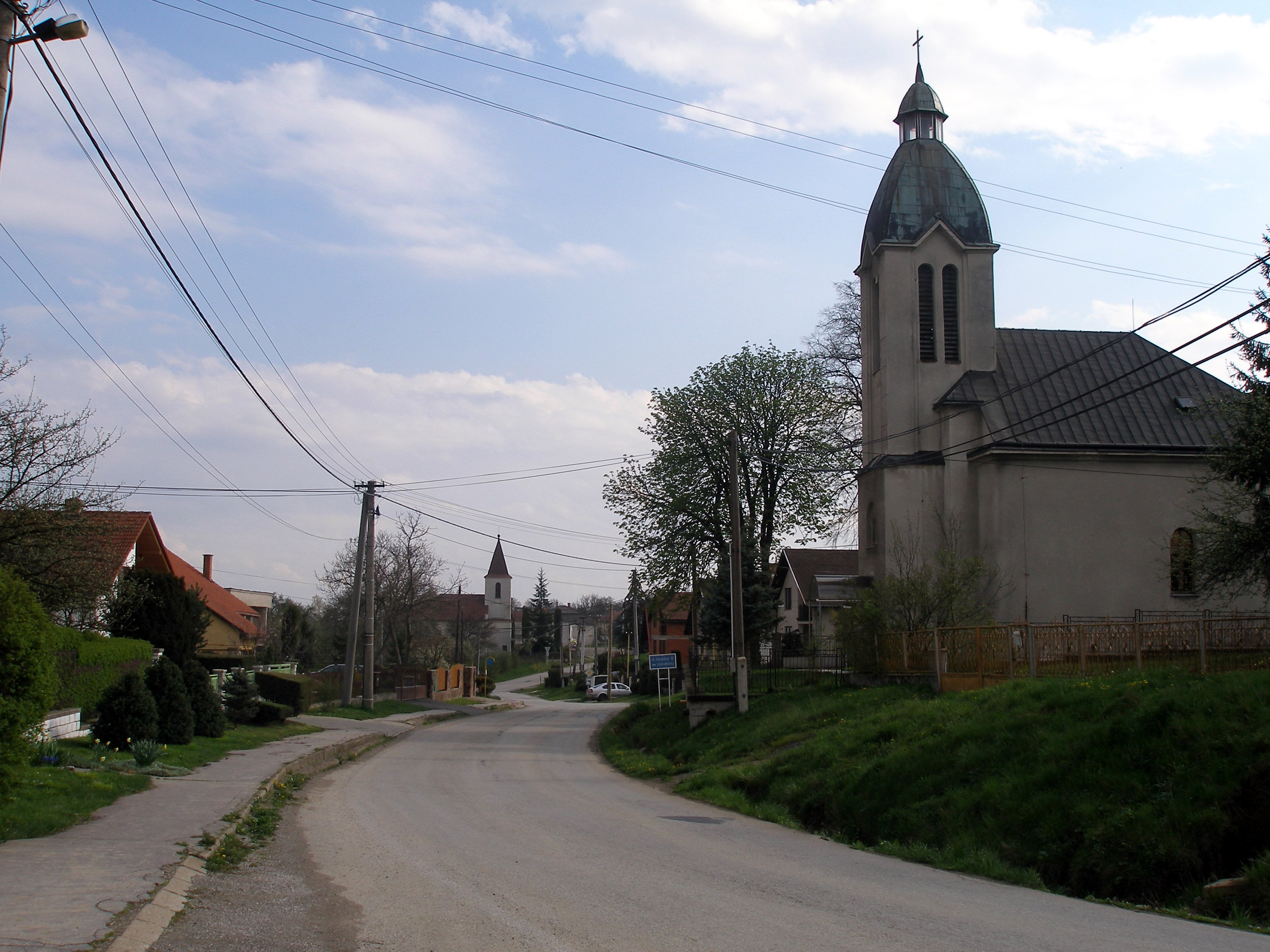 Obec Šarišské Bohdanovce okres Prešov región Šariš